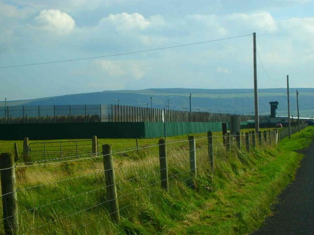 Magilligan Prison